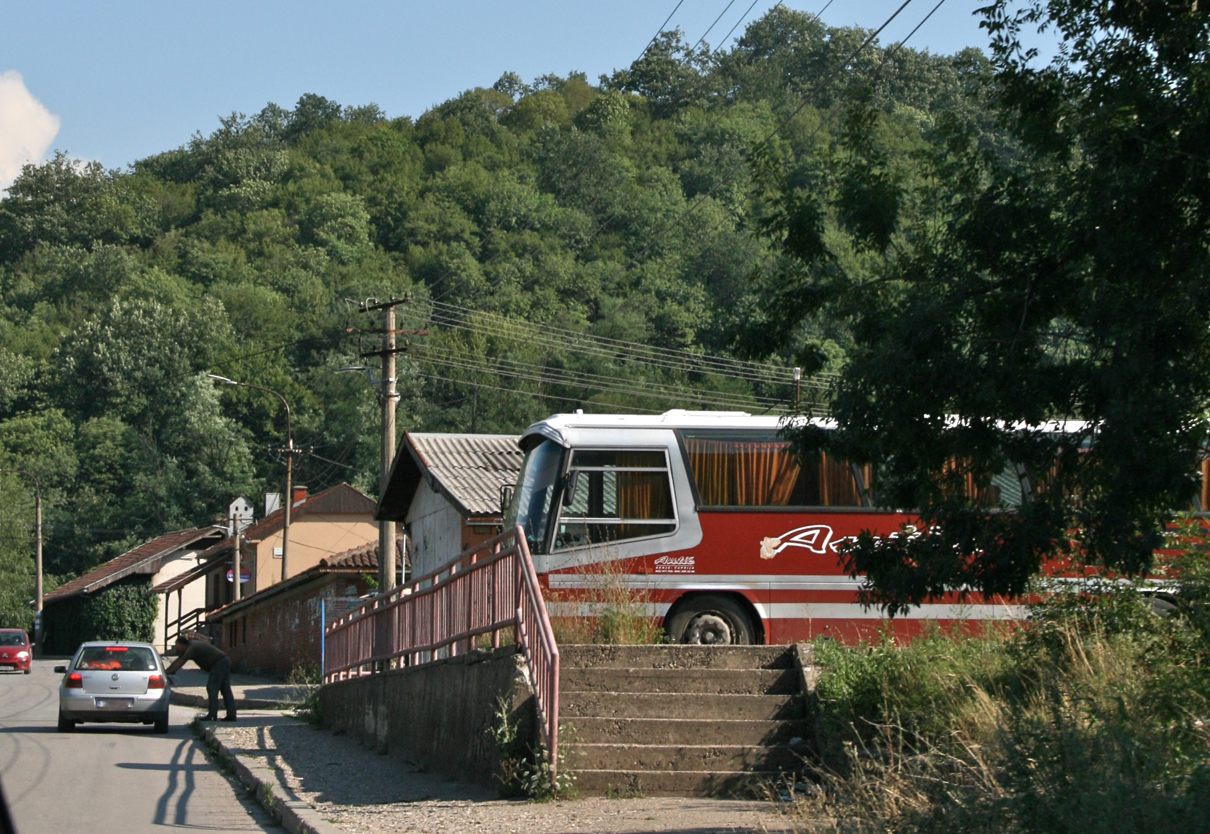 Путујући кроз Ресавицу